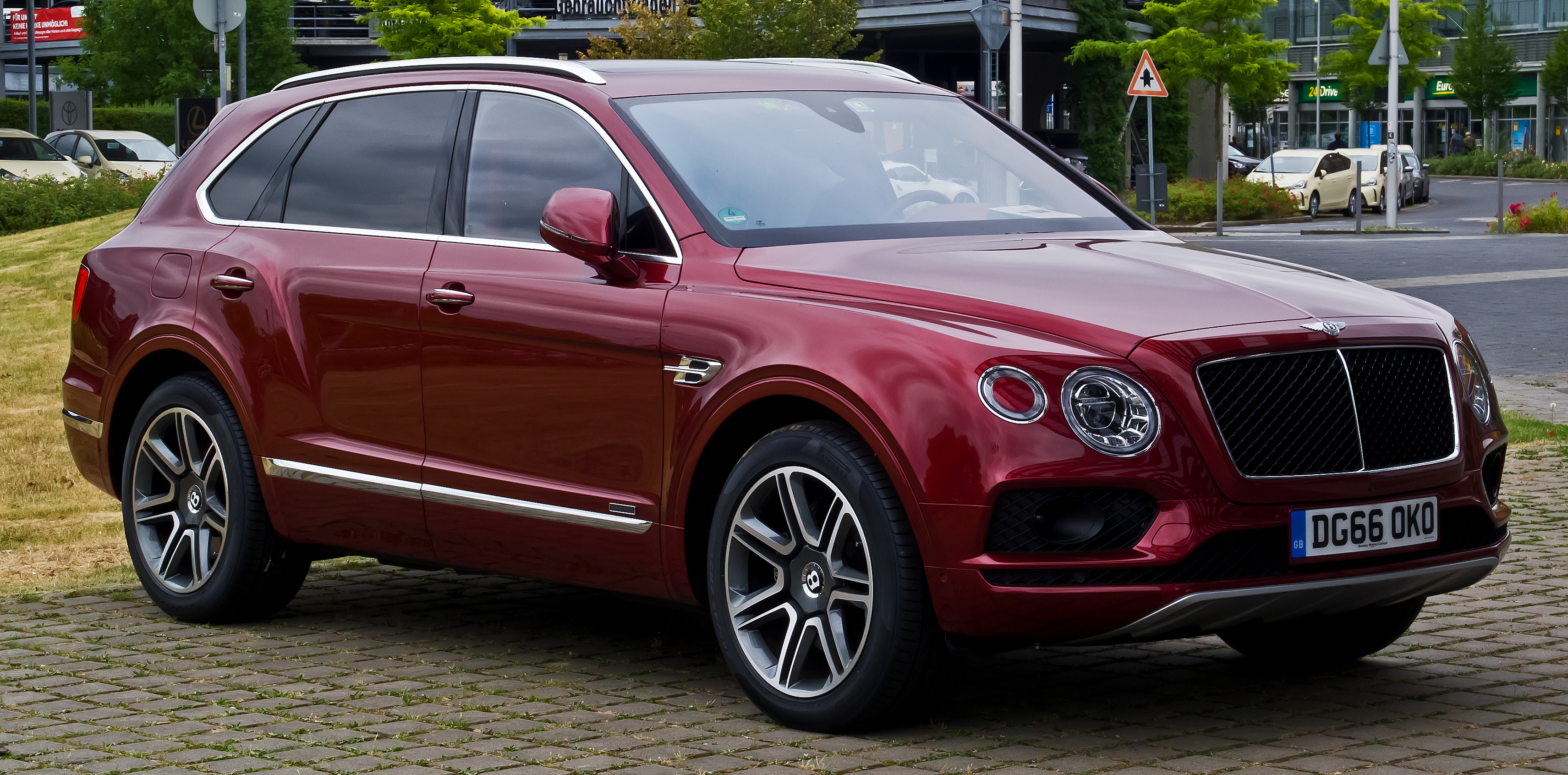 Bentley Bentayga Diesel